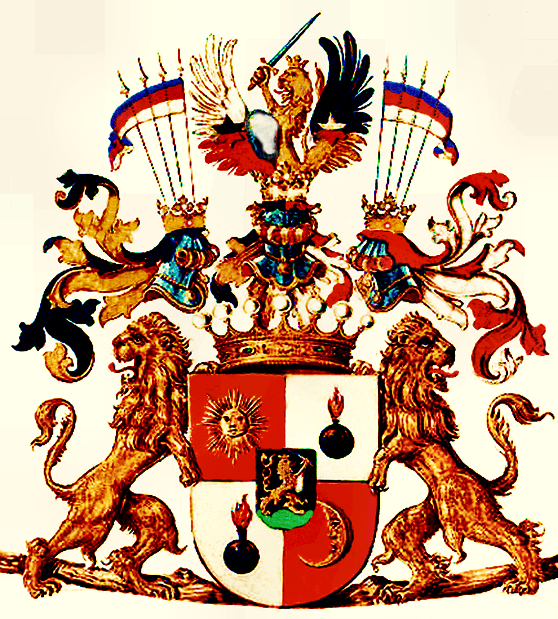 Wappen der Freiherrn von Wernhardt, ung. 1818